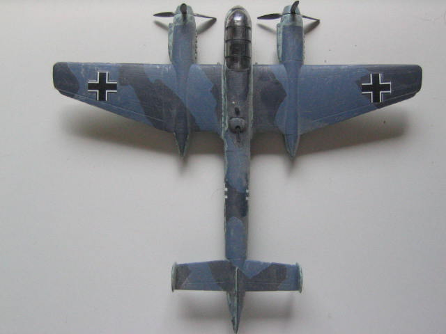 Das Bild zeigt ein von mir gebautes und photographiertes Modell der Arado Ar 240 in Aufsicht.